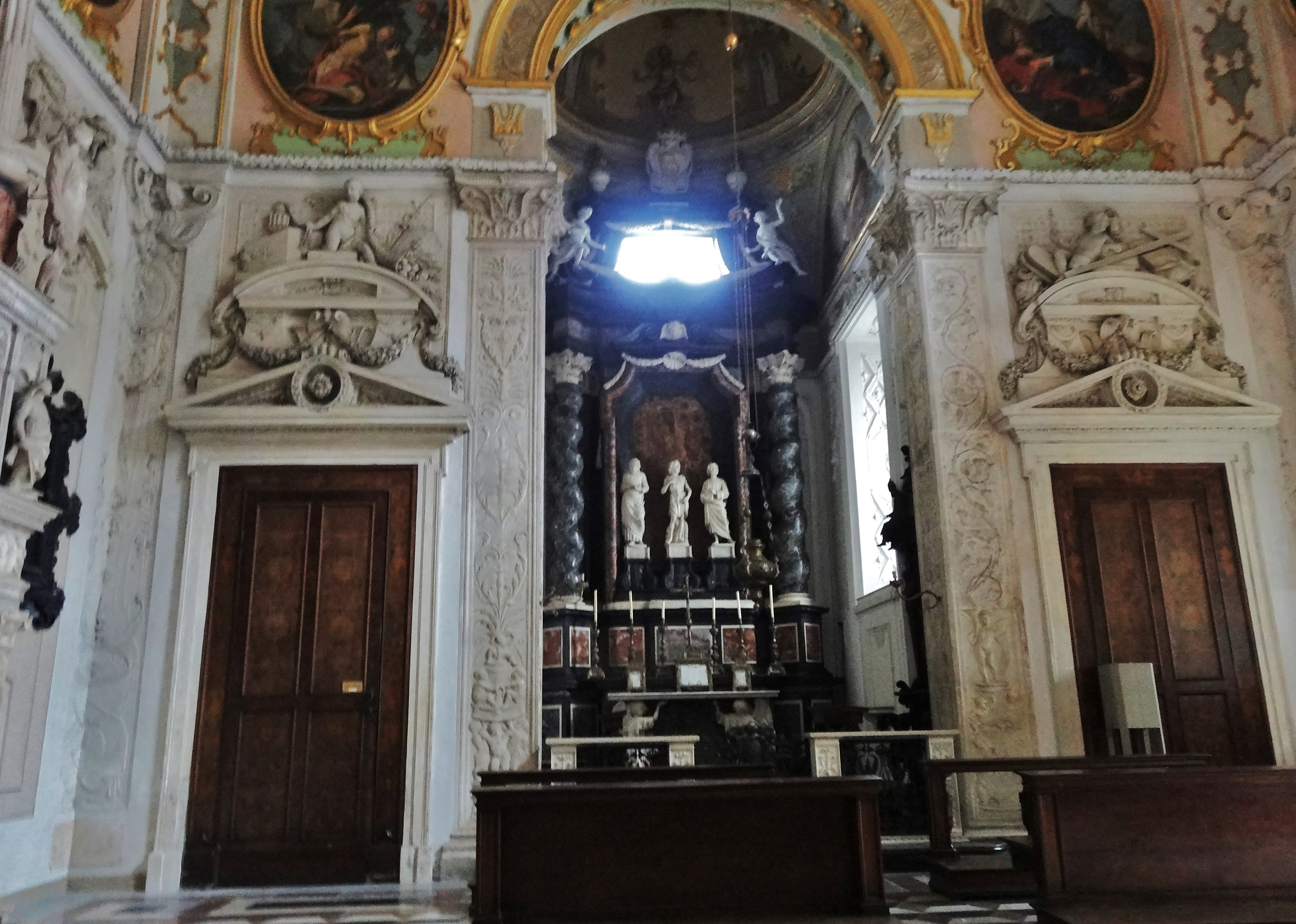 Innenansicht der Cappella Colleoni in Bergamo